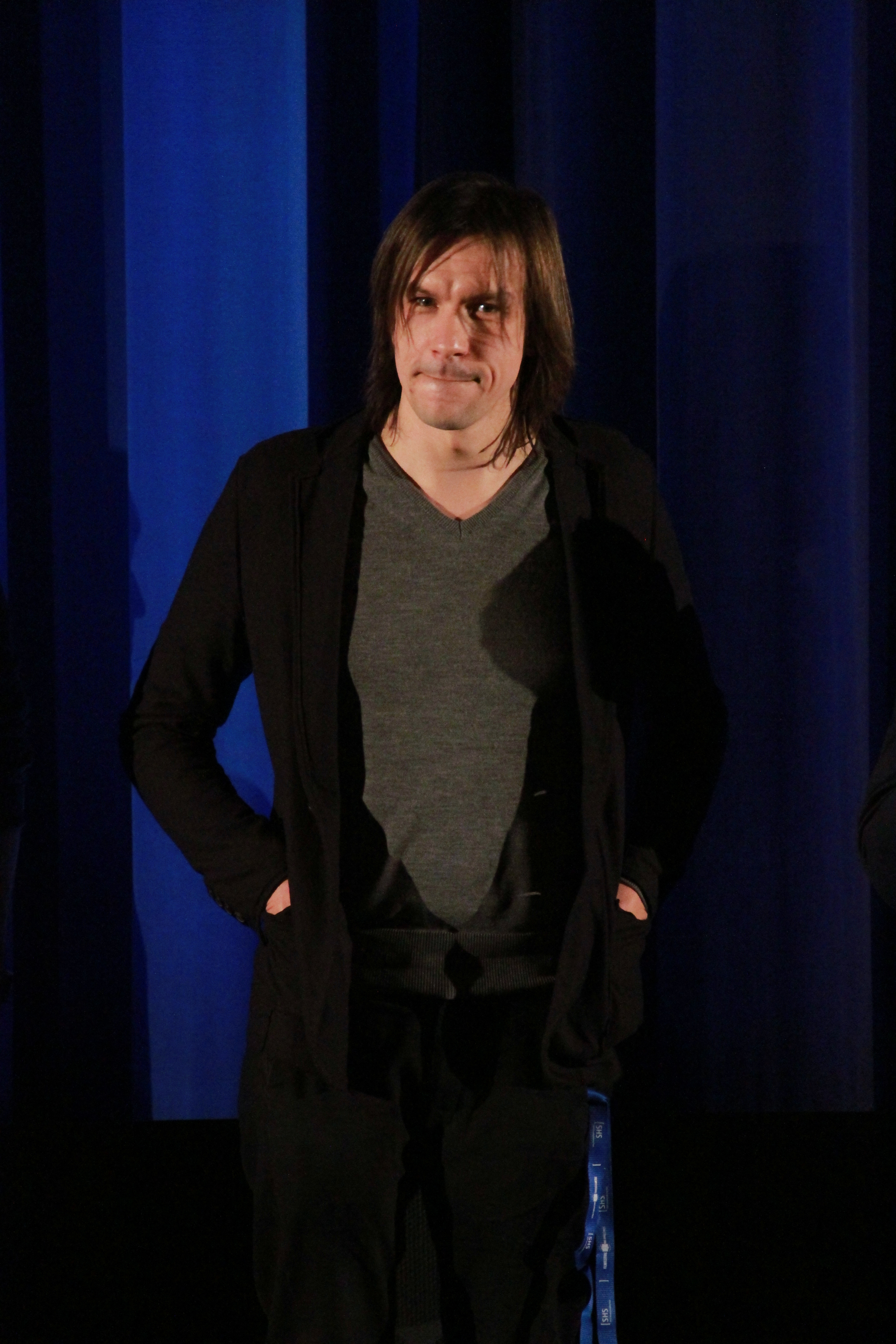 Andreas Köhler auf dem Max-Ophüls-Filmfestival 2015